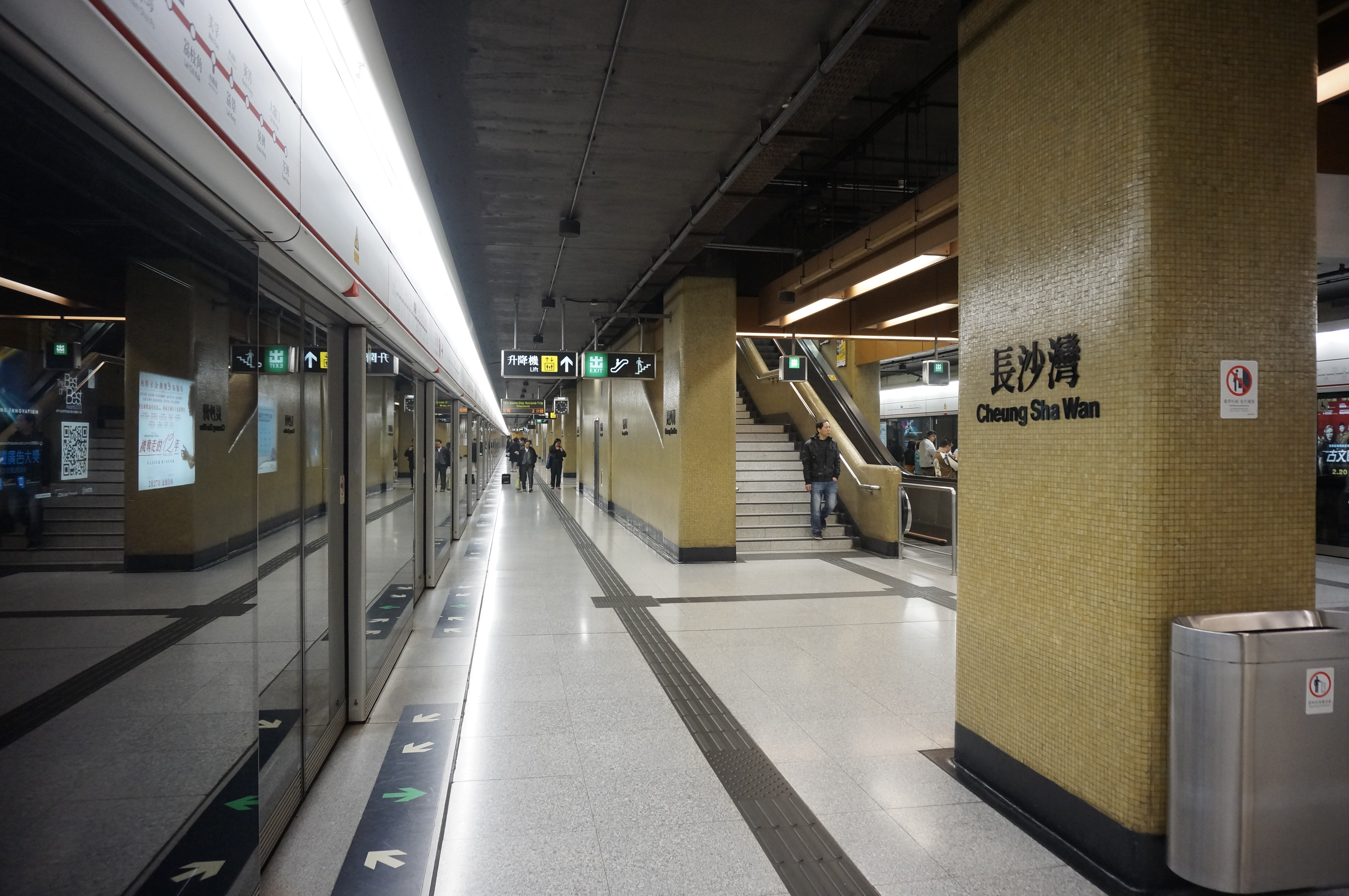 港鐵長沙灣站月台